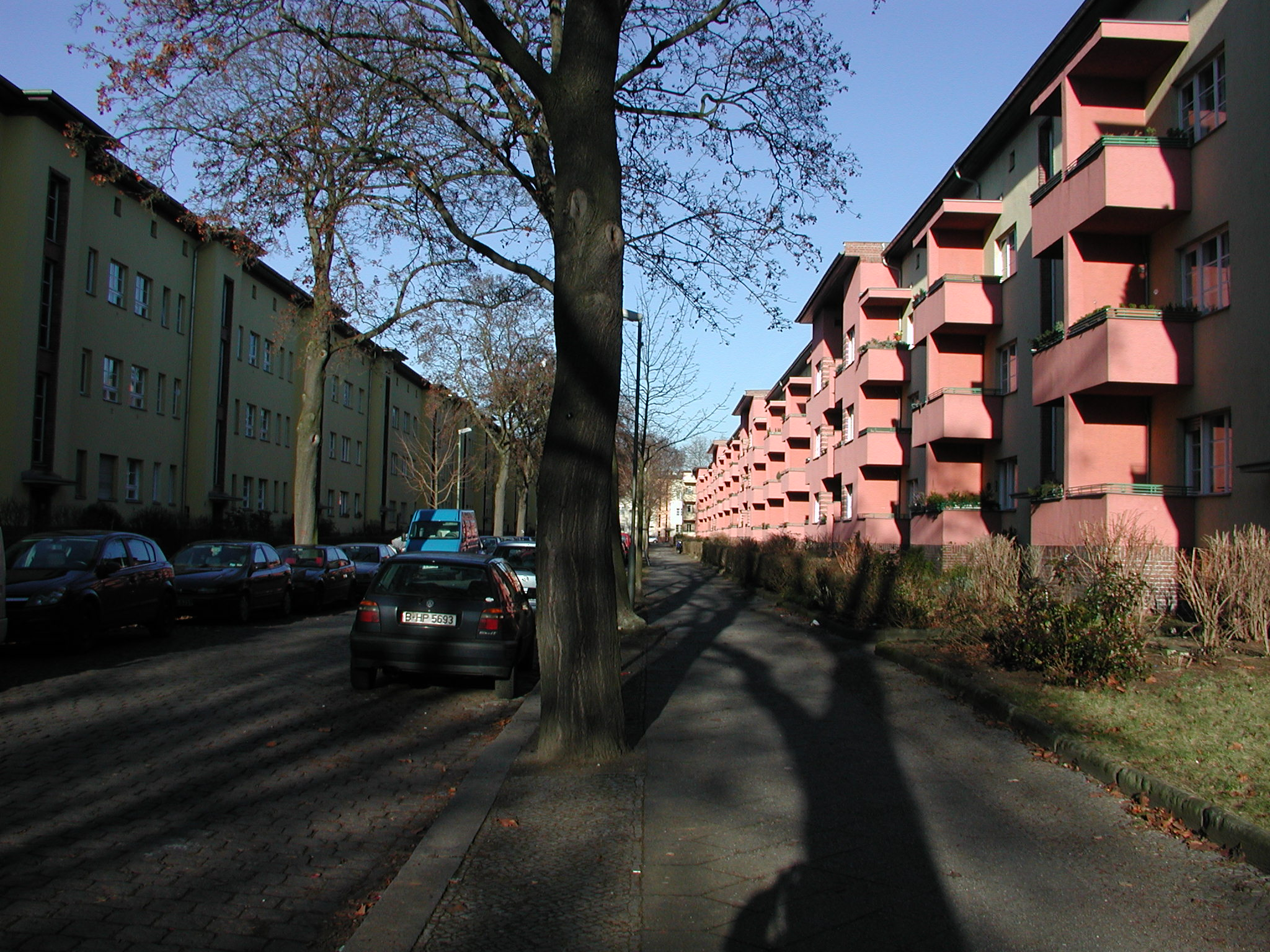 Wohnanlagen "Erlenhof" und "Ulmenhof", Ansicht in der Kraetkestraße